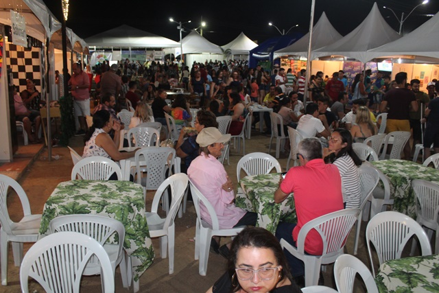 Foto da praça de alimentação da Expoeste Caraúbas